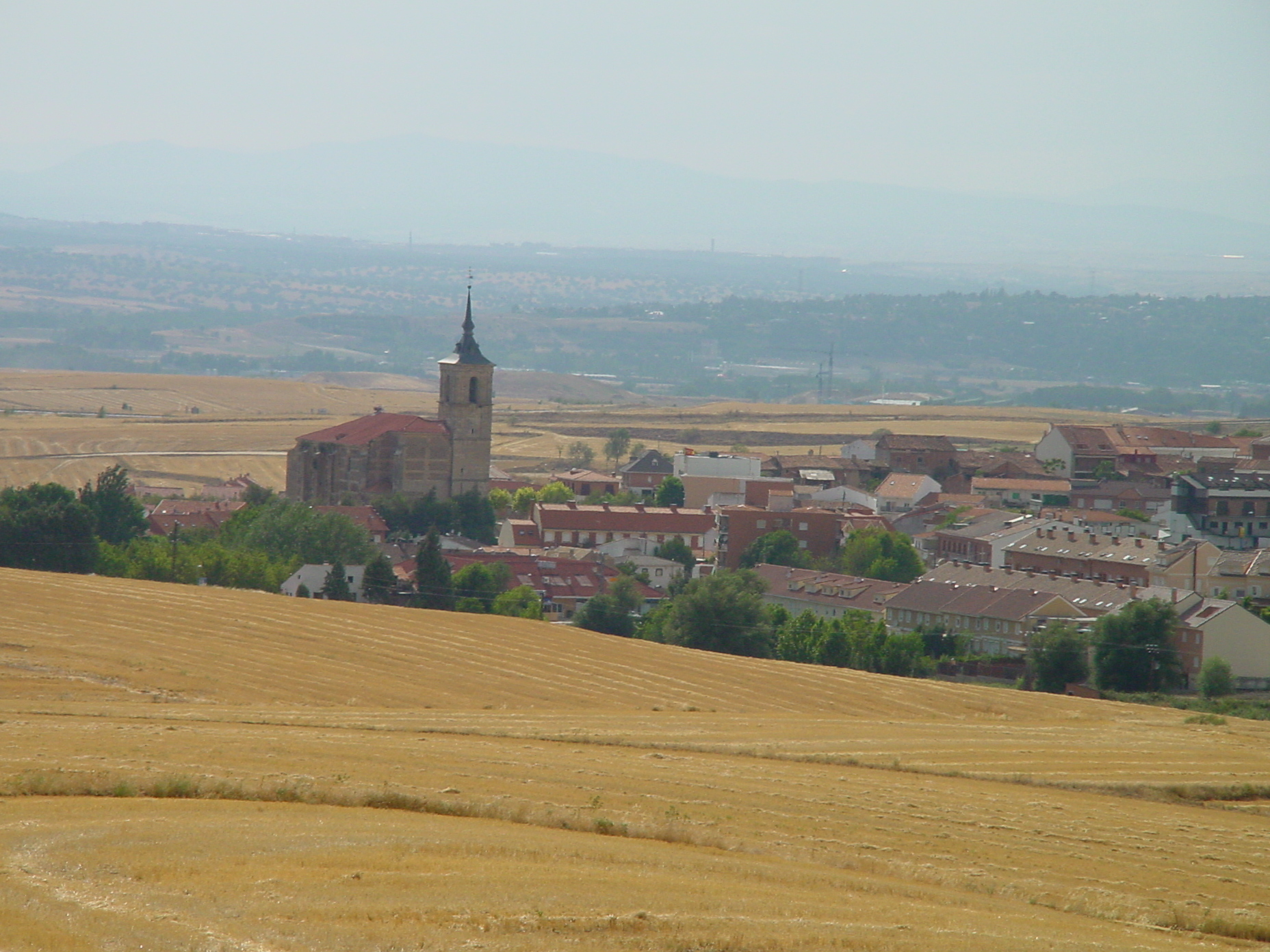 Vista general de Cobeña